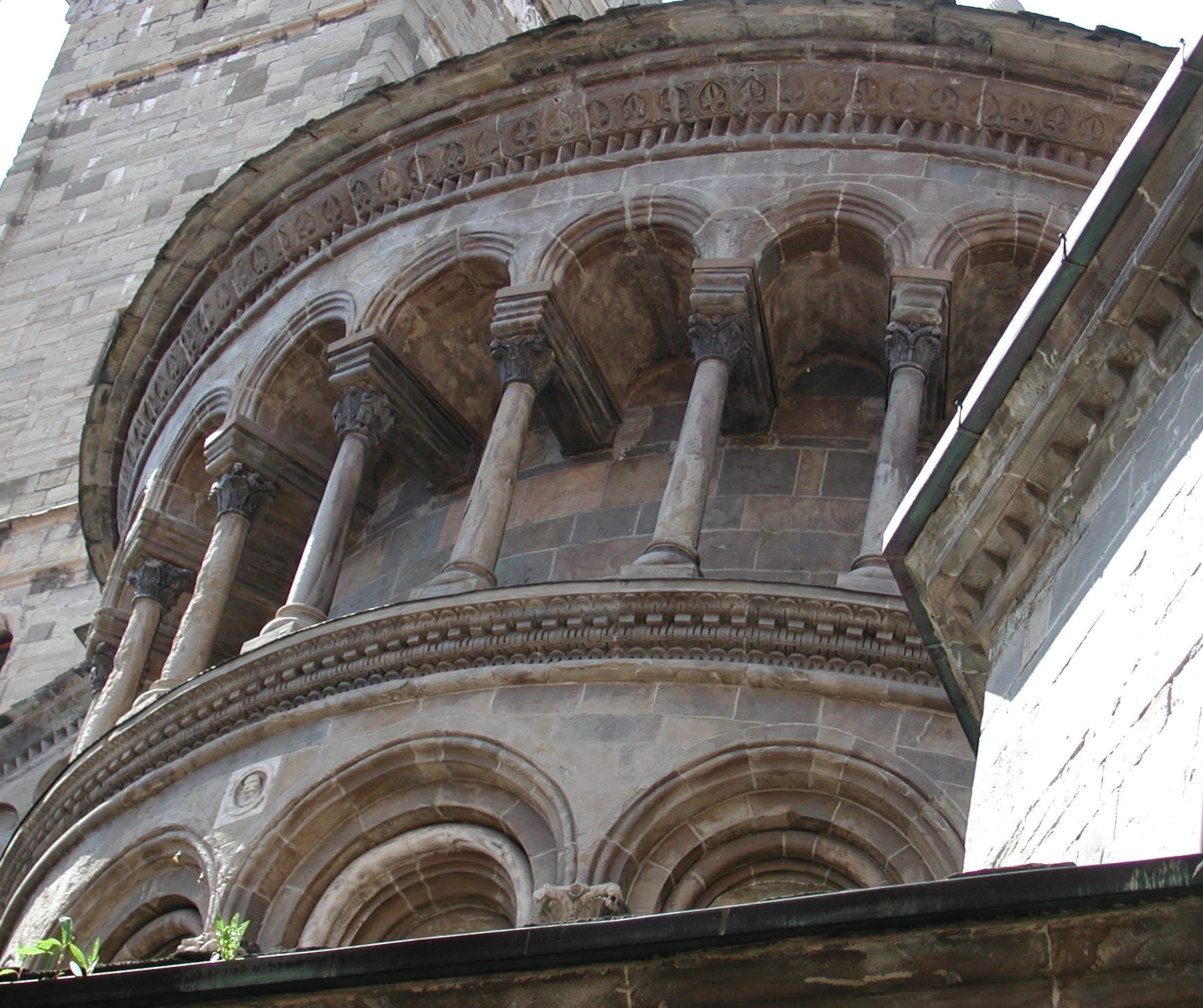 Santa Maria Maggiore, detail Bergamo, Italy